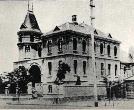 神田にあった日本キリスト教青年会会館の写真